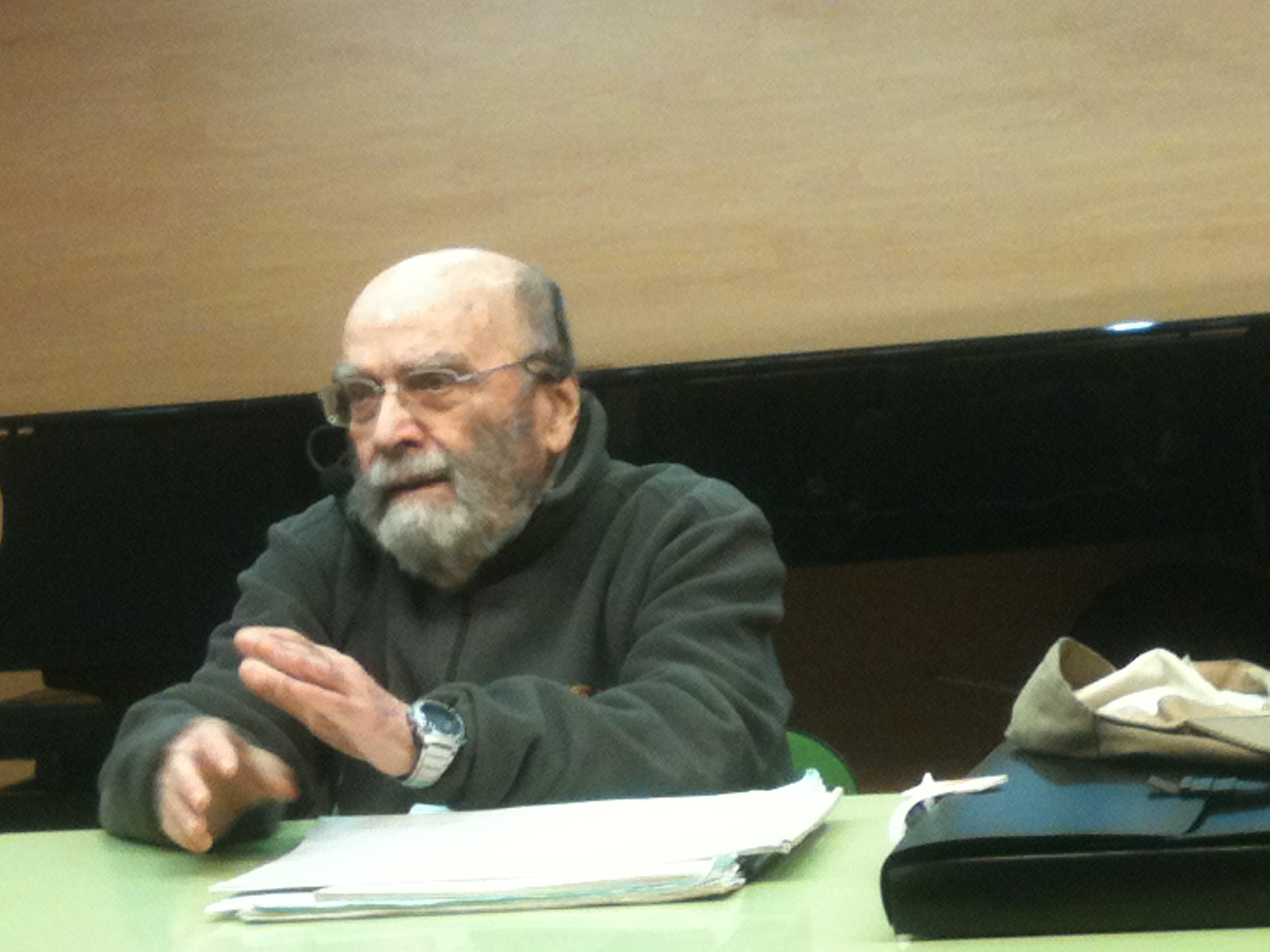 El compositor Luis de Pablo en el Conservatorio Profesional Joaquín Turina de Madrid, 5 de marzo de 2014.